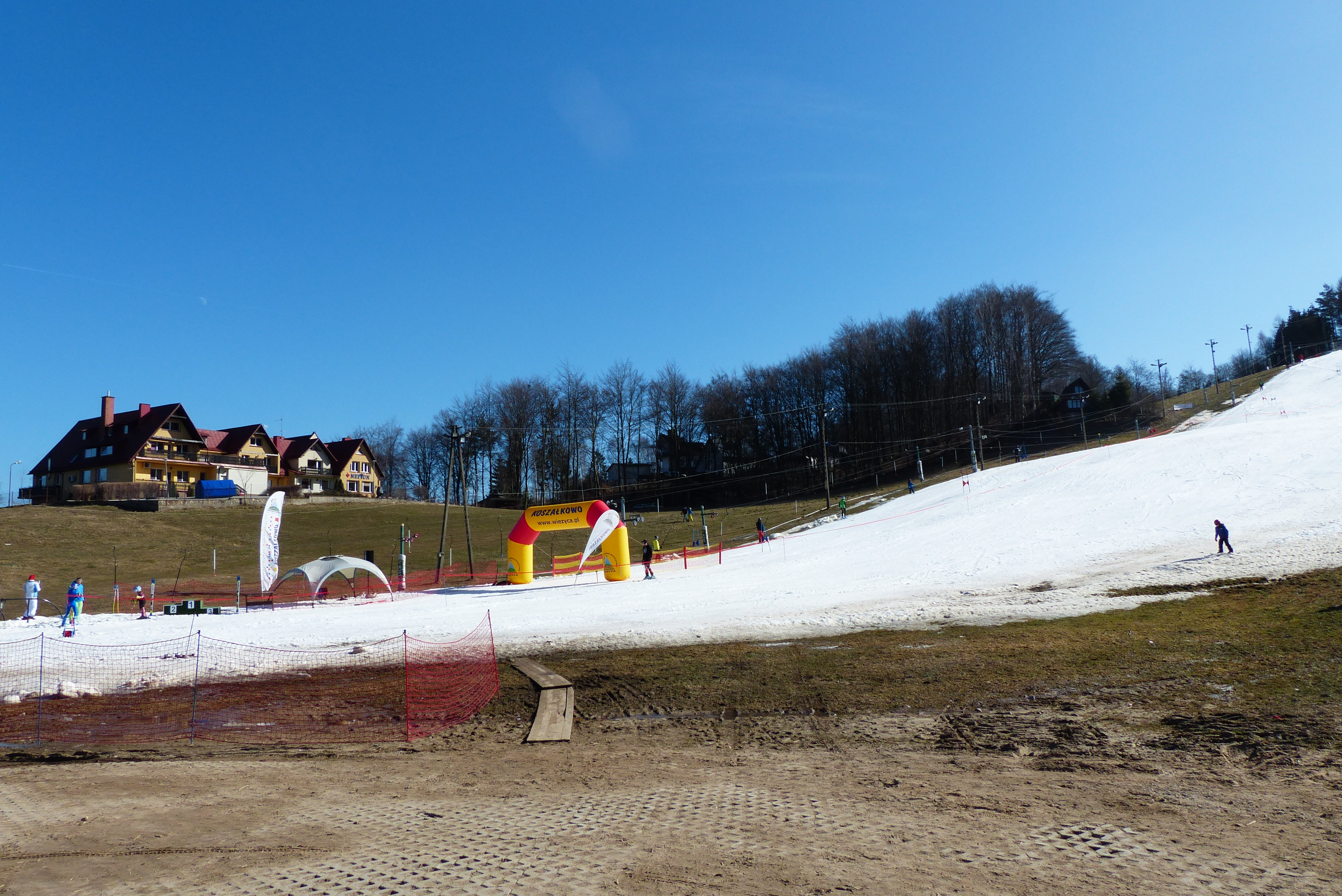 Koszalkowo Ski Station